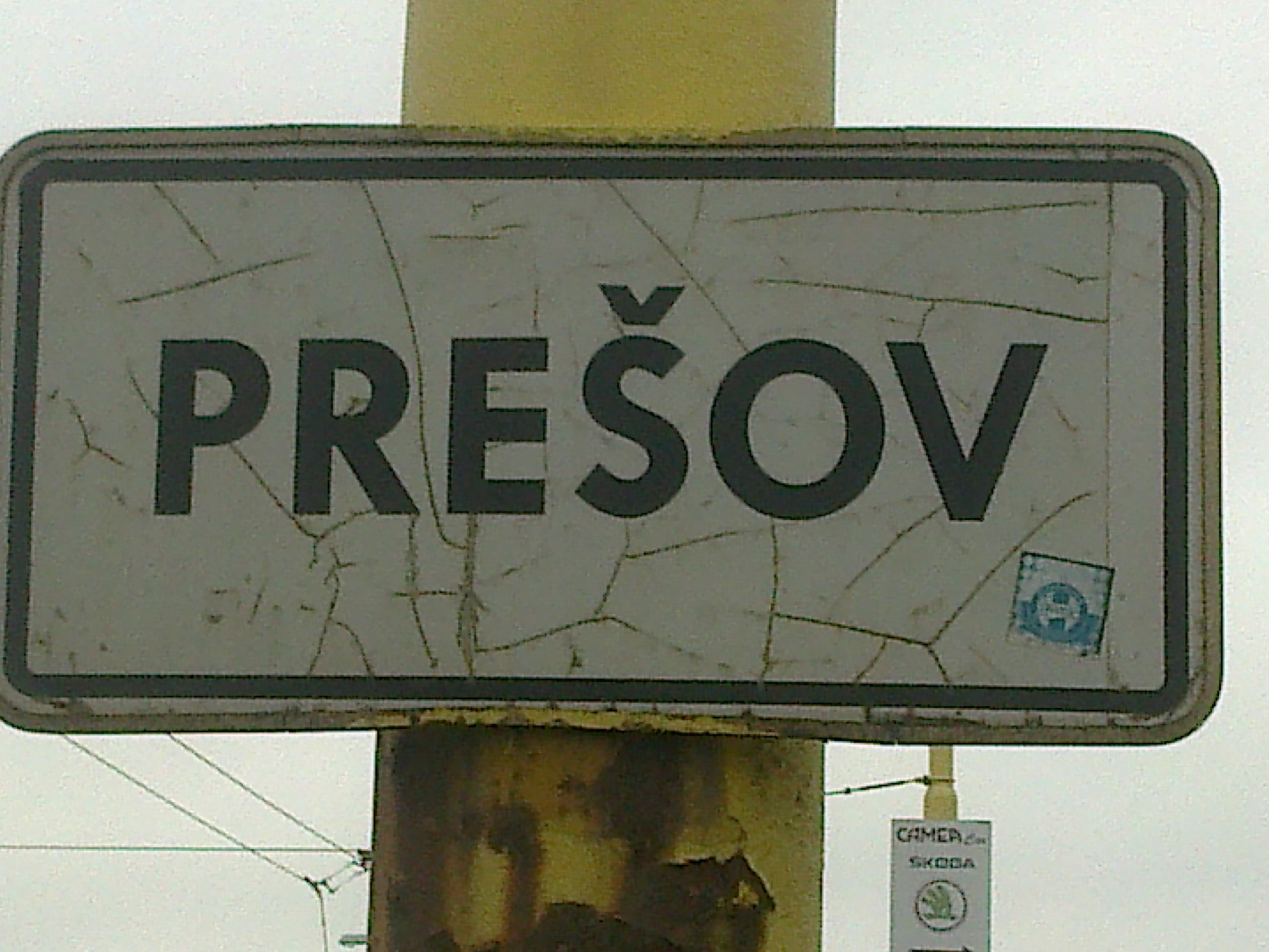 שלט כניסה לעיר Presov